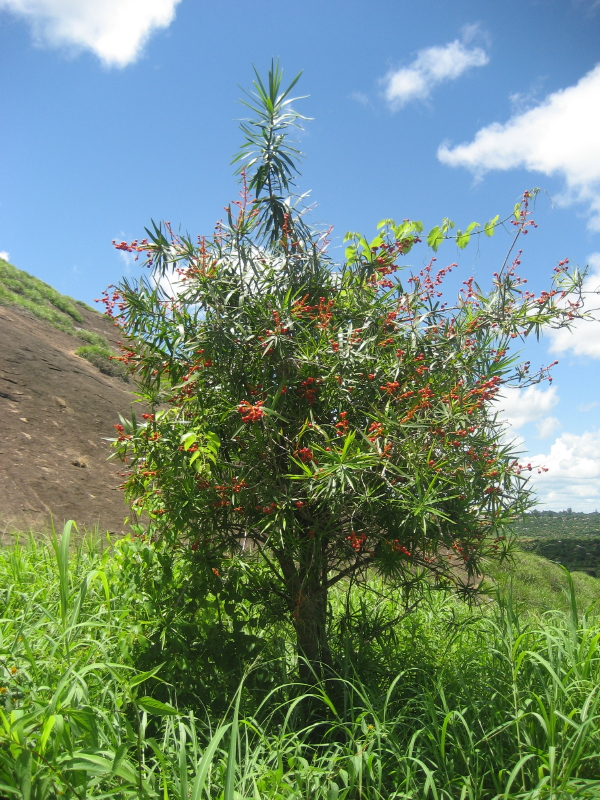 Dracaena mannii, Cabeça do Velho, Chimoio, Mozambique